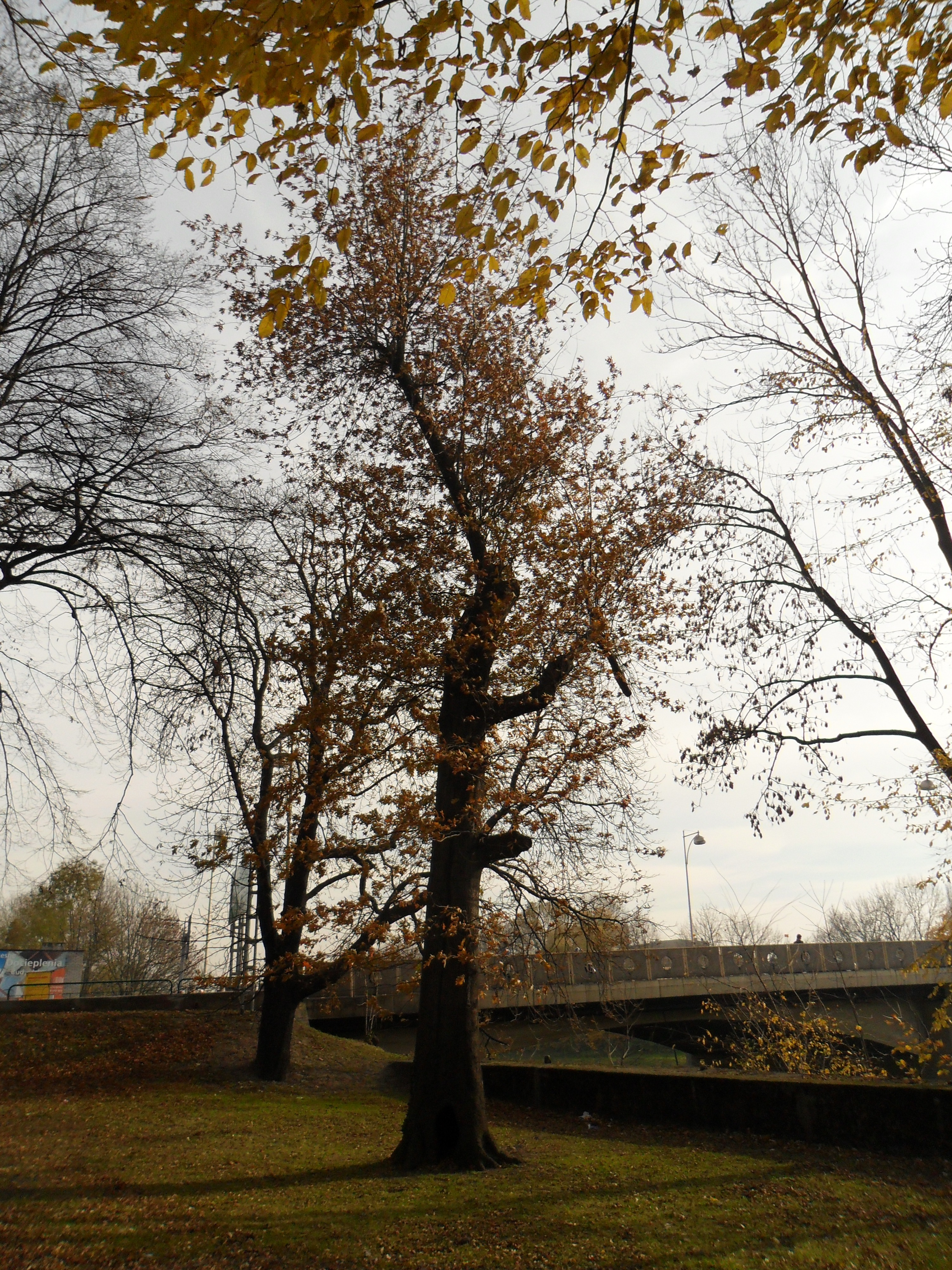 Dąb błotny w parku Zamkowym w Raciborzu. Ustanowiony pomnikiem przyrody.